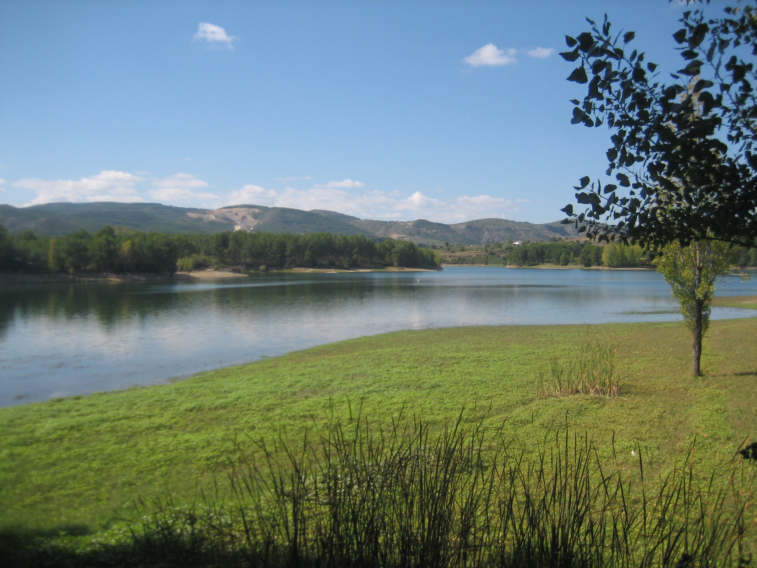 Embalse del Regajo, en la comarca del Alto Palancia (provincia de Castellón, España). En el curso medio del río Palancia. This is a photography of a Site of Community Importance in Spain with the ID: ES5232003. Natura2000 entry, EEA entry